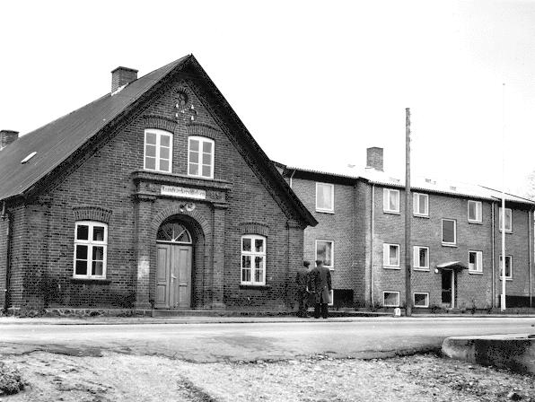 Essenbæk Sogns Haanværkerforenings Stiftelse (senere Assentoft Kro) og Essenbækhus.